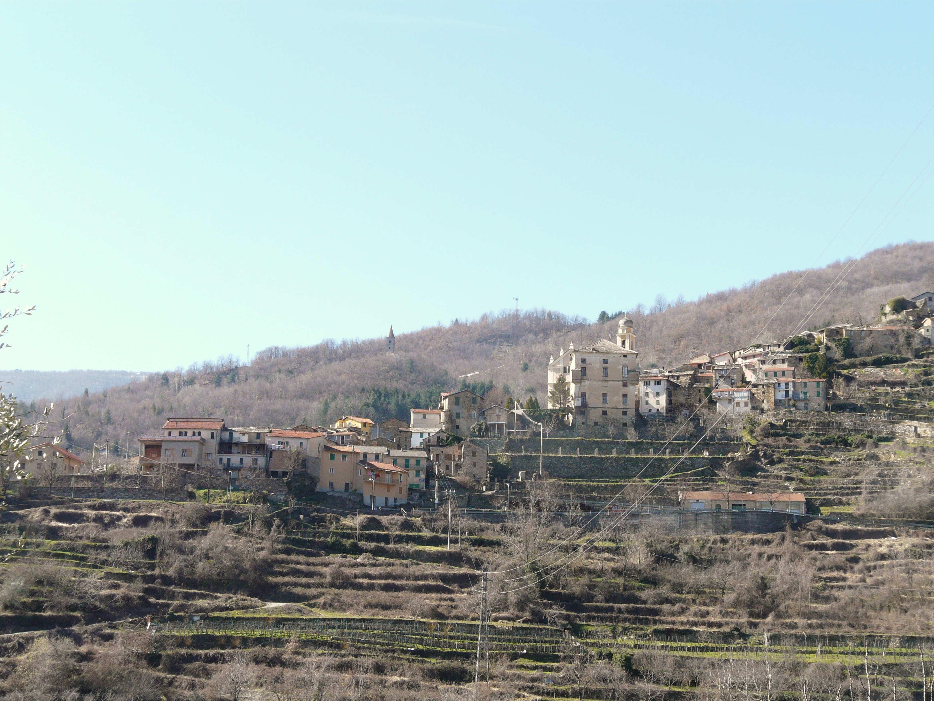 Rezzo, Liguria, Italia